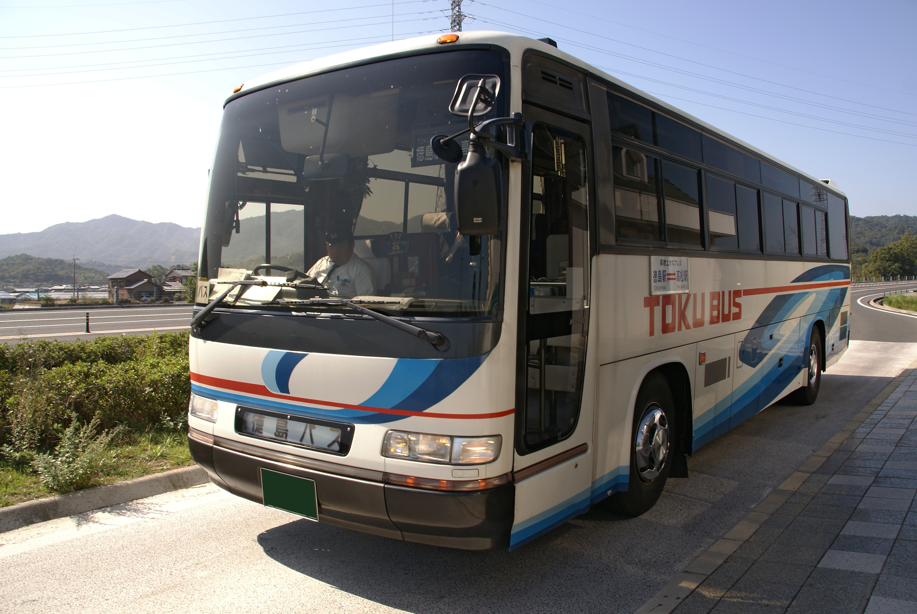 Takamatsu Expressway Ochi bus stop in Higashikagawa, Kagawa prefecture, Japan